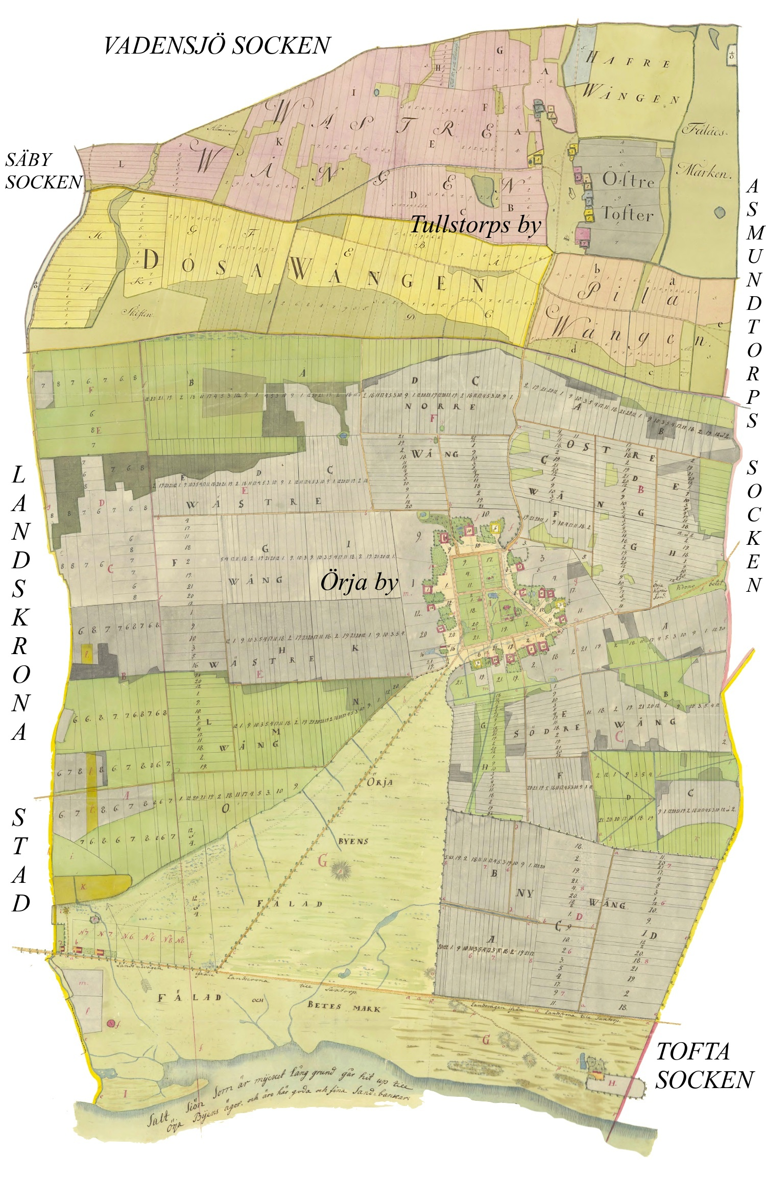 Karta över Örja socken från 1760-61 vid tiden för Storskiftet. Kartan sammanställd av user:cucumber.